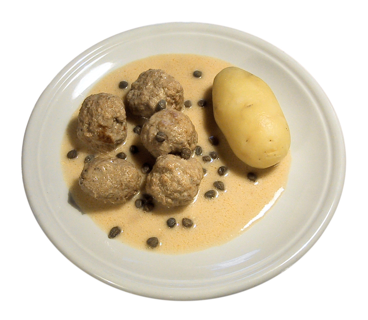 Königsberger Klopse. Eigenes Foto, Public Domain